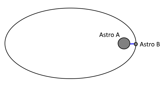 Imagem ilustrando o conceito de periastro